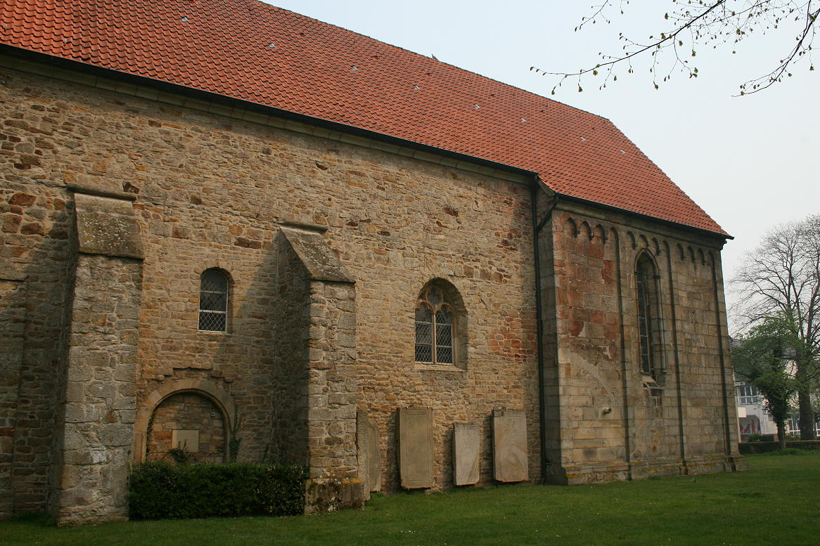 Evangelische Dionysiuskirche Recke Grabplatten This is a photograph of an architectural monument.